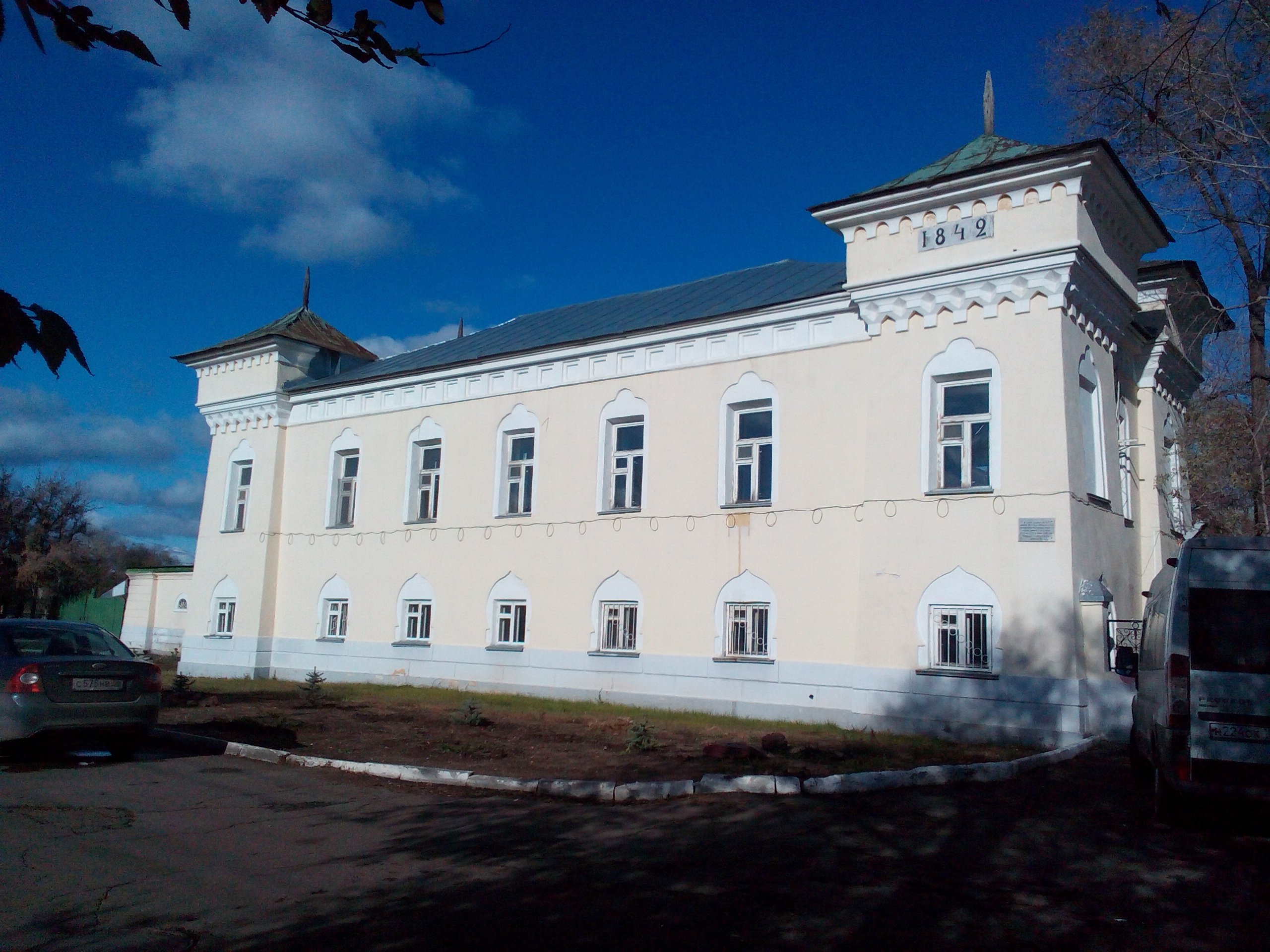 Караван-сарай: проспект Парковый, 6, Оренбург, Оренбургская область